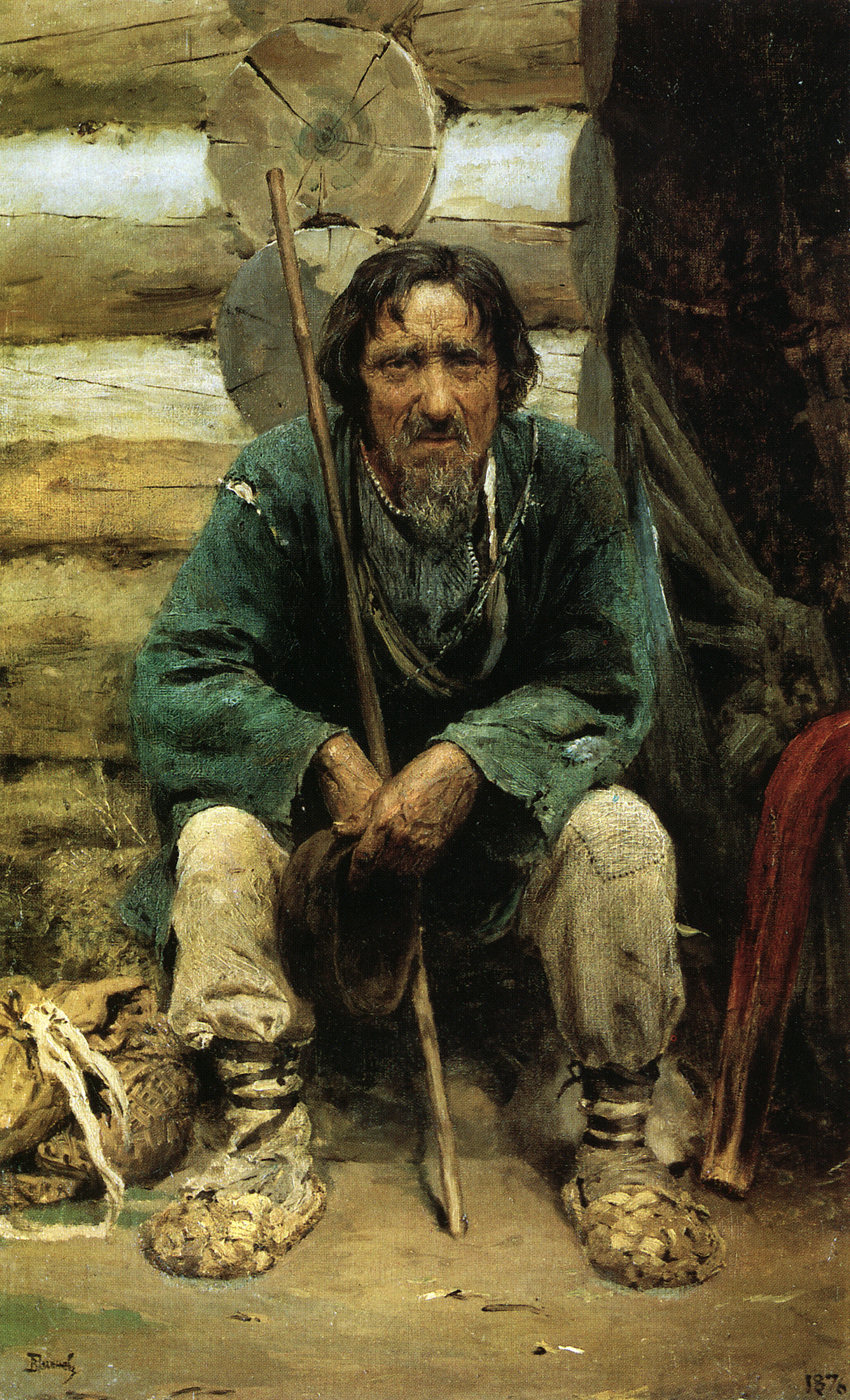 The bylinas narrator Nikita Bogdanovlabel QS:Len,"The bylinas narrator Nikita Bogdanov"label QS:Lru,"Сказитель былин Никита Богданов"